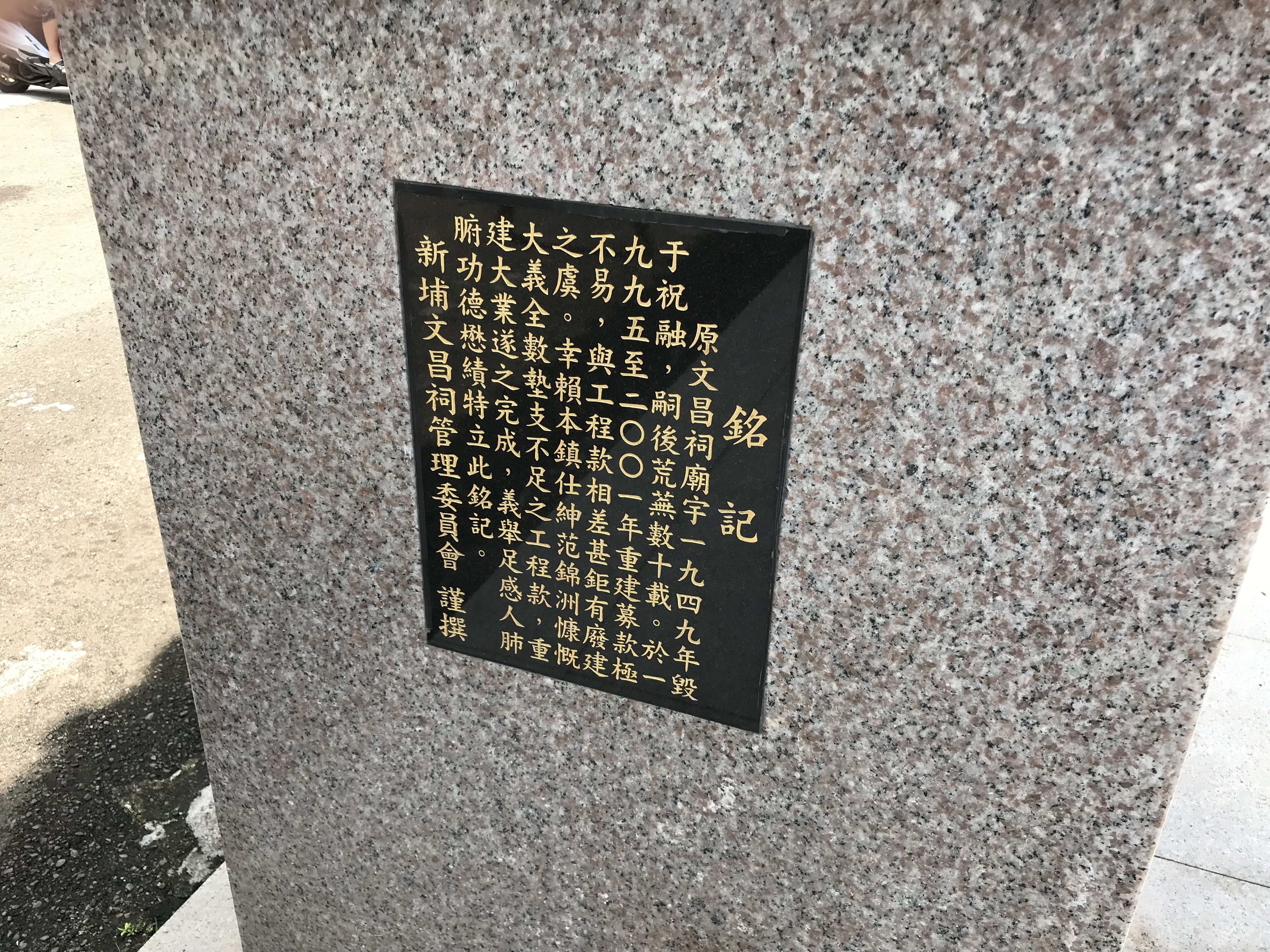 中文（台灣）: 新埔文昌祠銘記